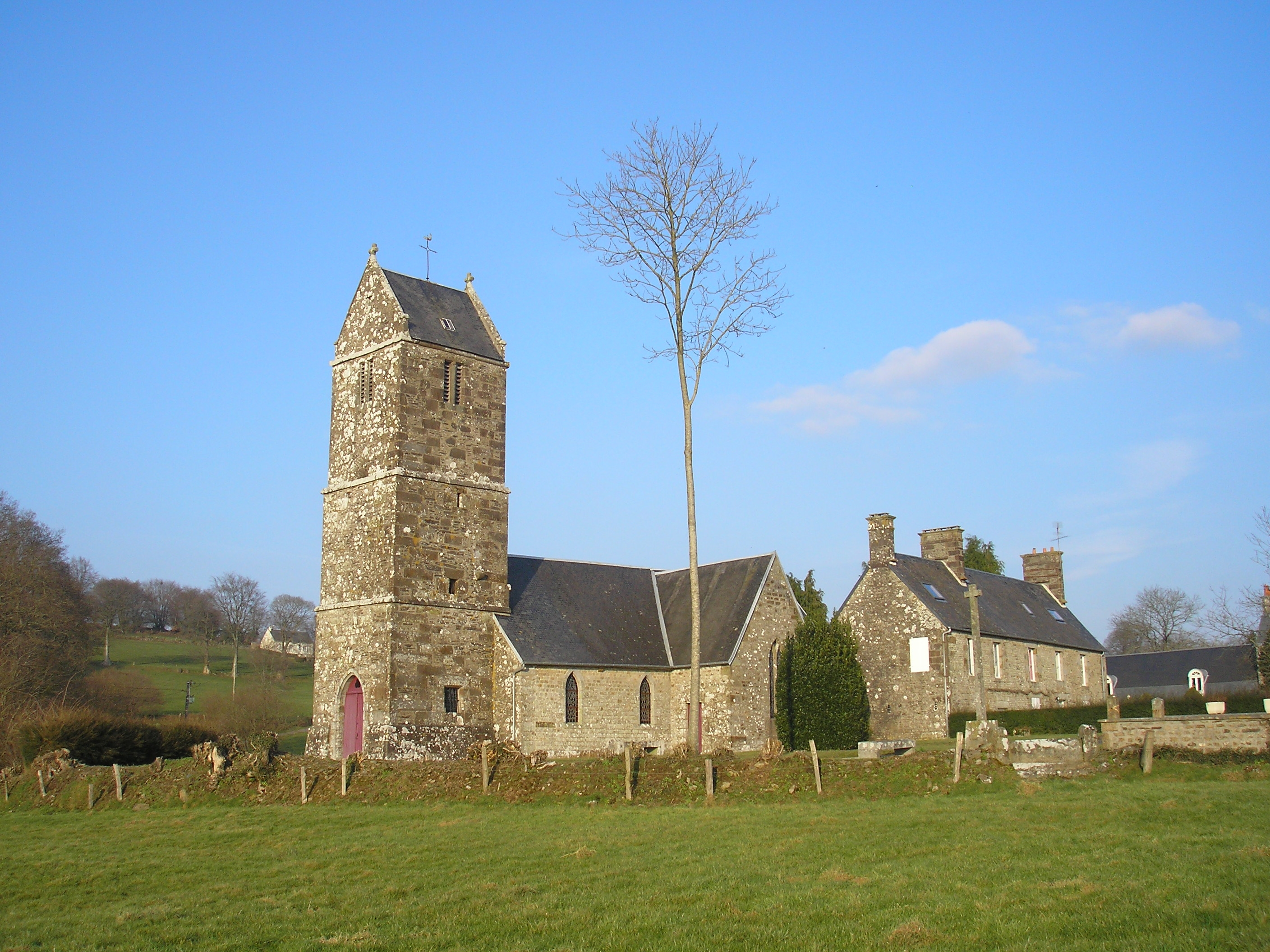 Beauficel (Normandie, France). L'église Saint-Pierre.